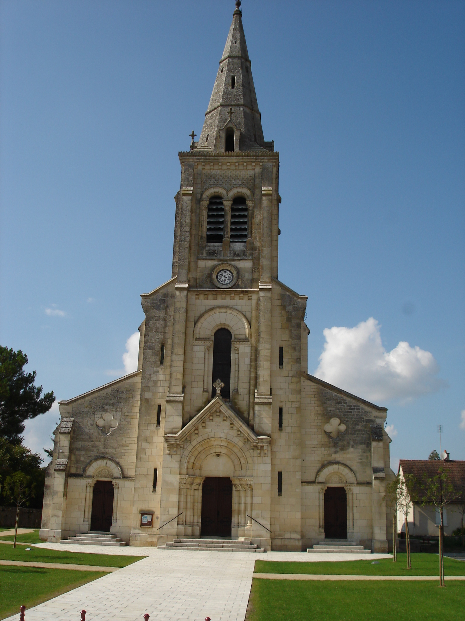 Tournon-Saint-Martin (36) : L'église Saint-Martin.